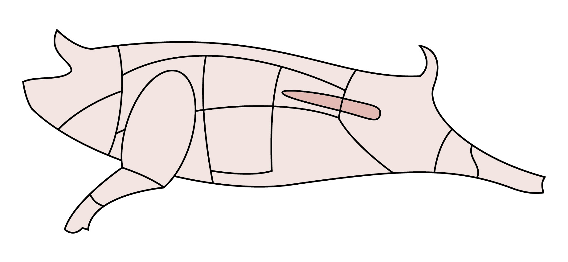 Schematische Darstellung eines Schweins, Filet.